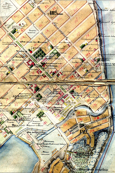 Карта Барнаула Фрагмент плана города Барнаула